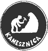 Herb Kamesznicy